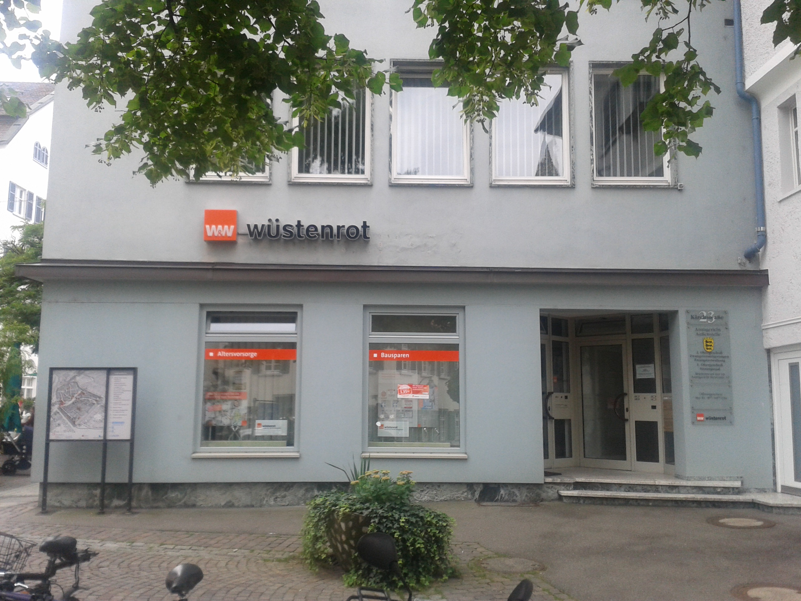 Wüstenrot